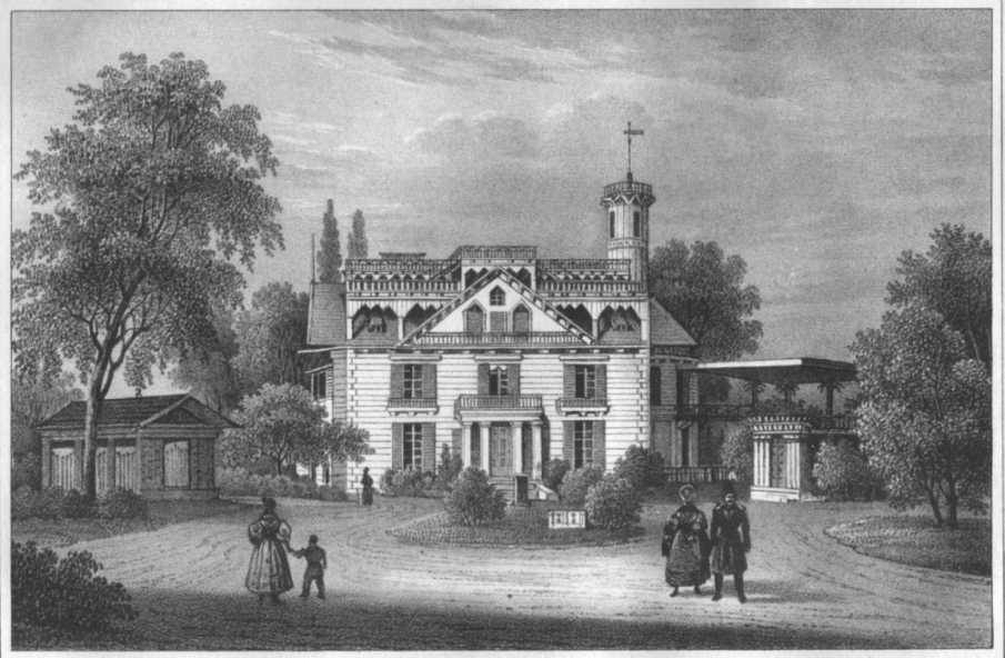 Aus "Saxonia" von Arldt. Das sonst Putiatin'sche Landhaus zu Zschachwitz, Lithographie, Dresden, Pietzsch & Comp. 1837. 14 x 21 cm. Das Bild zeigt das Landhaus des Fürsten Nikolaus Abramowitsch Putjatin in Klein-Zschachwitz bei Dresden.